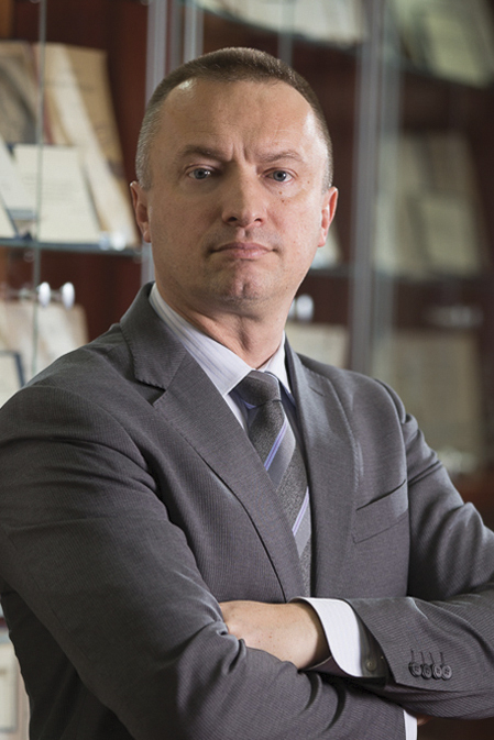 Српски (ћирилица): др Бојан Пајтић